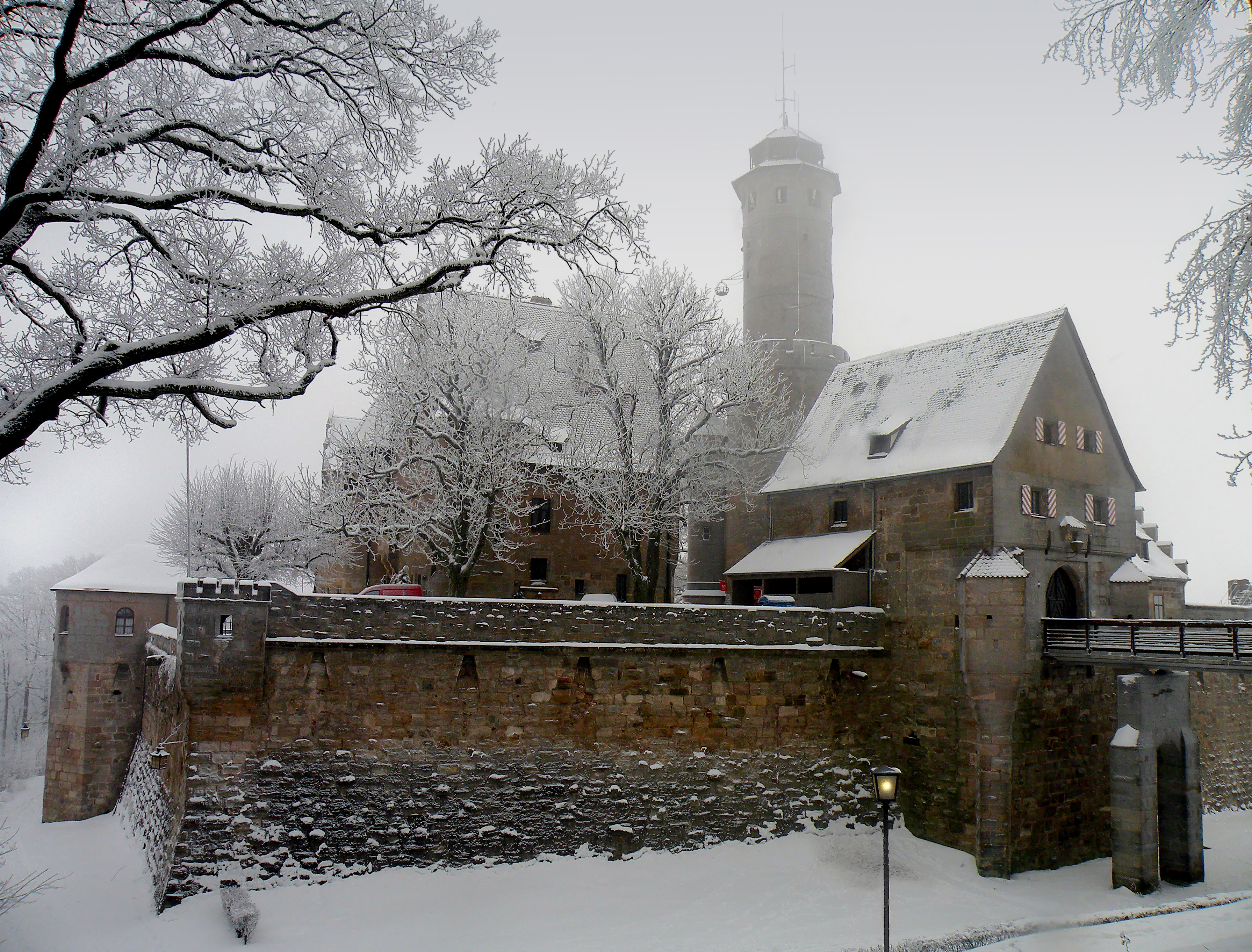 Bamberg. Schloss Altenburg